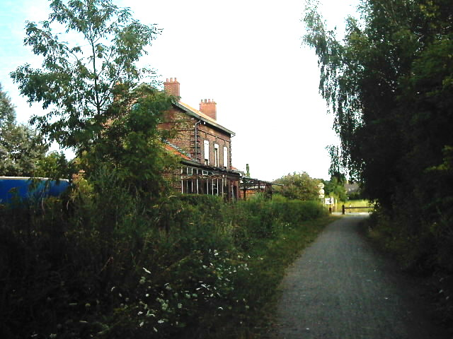 Ancienne gare.